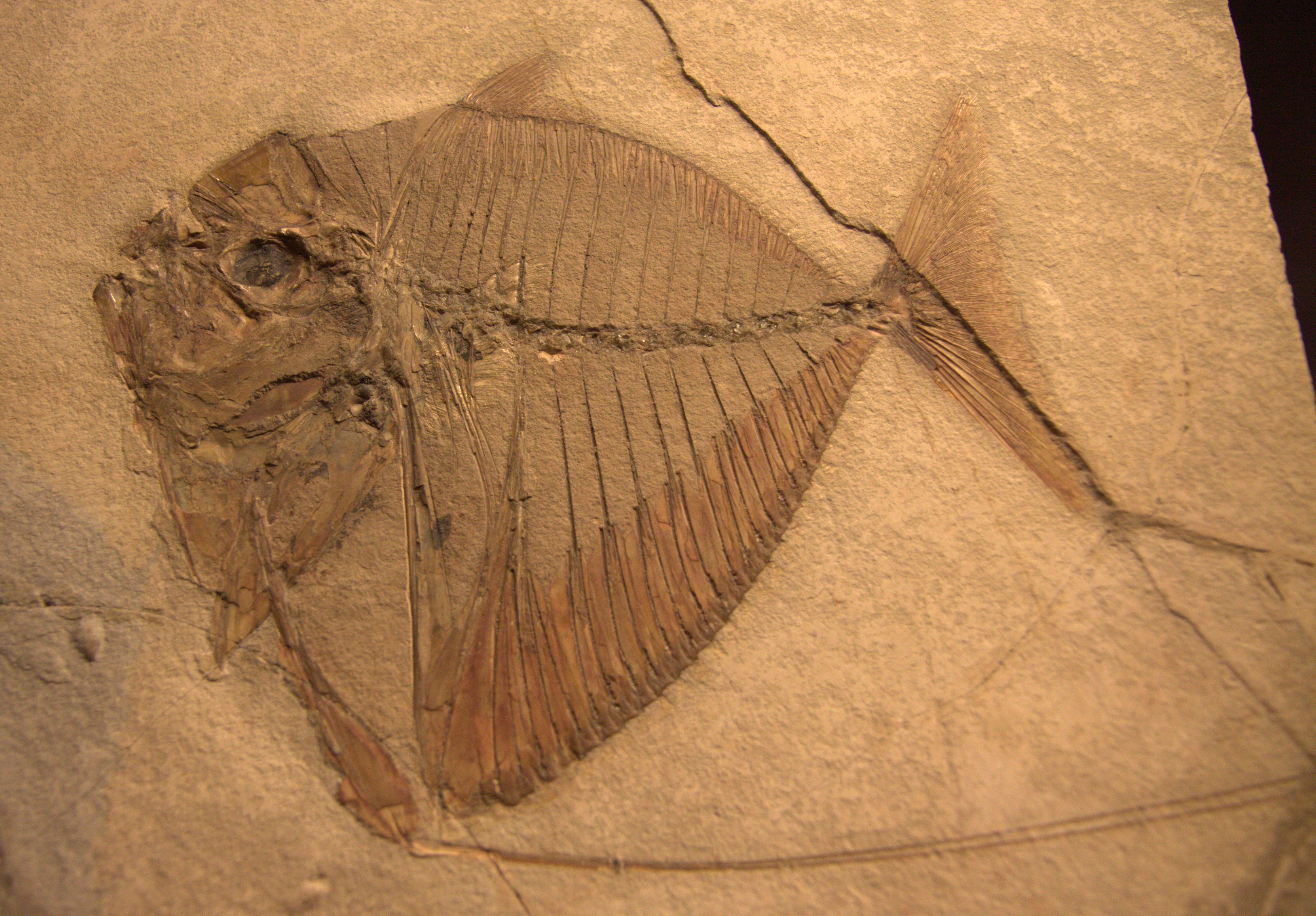 Daté d'environ 50 millions d'années, il est considéré comme proche du poisson lune. Il a été découvert à Monte Bolca en Italie. The making of this document was supported by Wikimédia France. (Submit your project!)